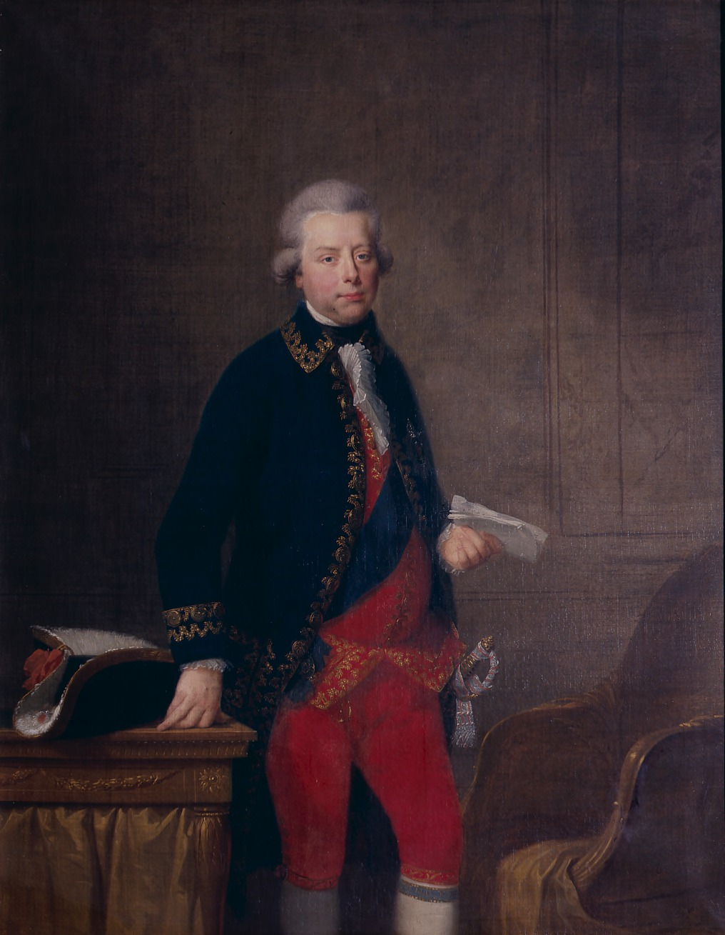 Portret van stadhouder Willem V der Nederlanden.